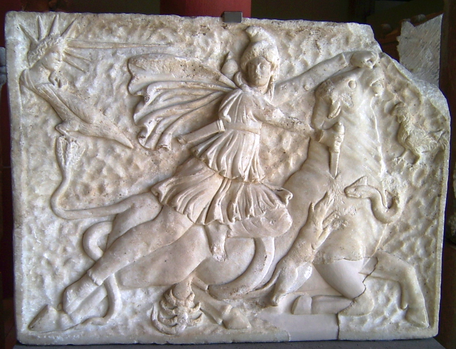 Kultrelief des Gottes Mithras, 2./3. Jh. For other images, see gallery Römisch-Germanisches Museum.